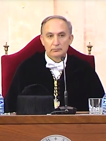 Herrera apoya a la investigación en la inauguración del curso académico 2018-2019